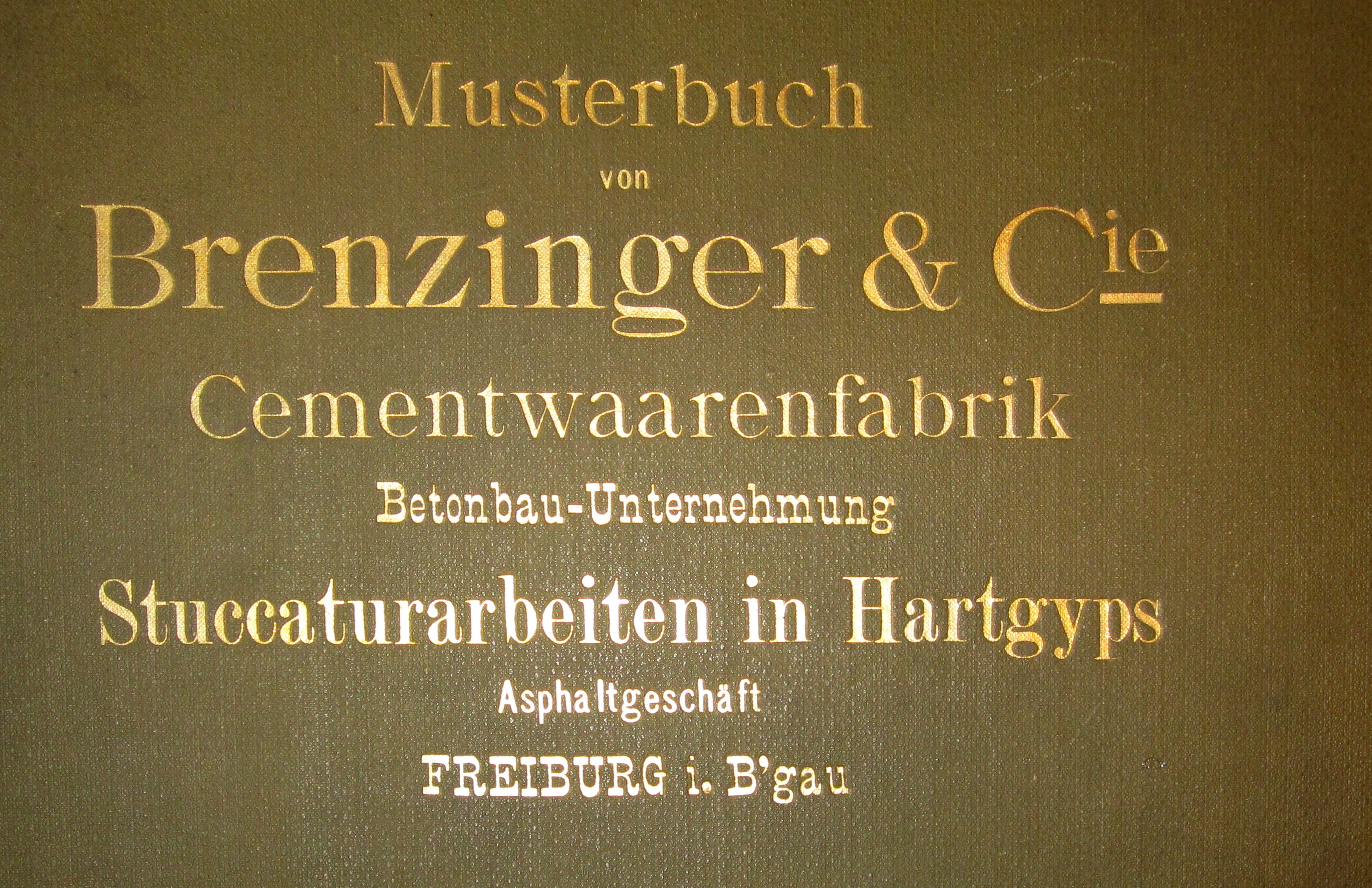 Einbandseite des Musterbuches des Unternehmens Brenzinger & Cie., Freiburg im Breisgau